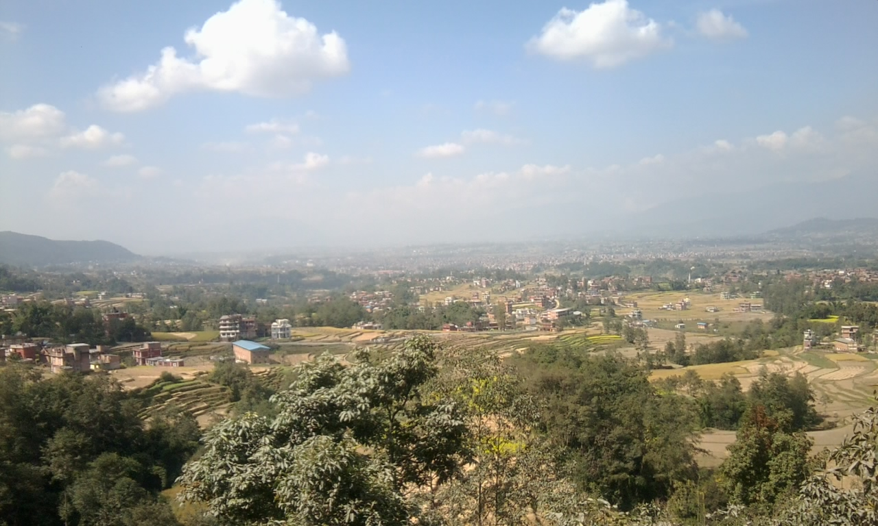 नेपाली: Kathmandu valley from Sanga bhanjyang